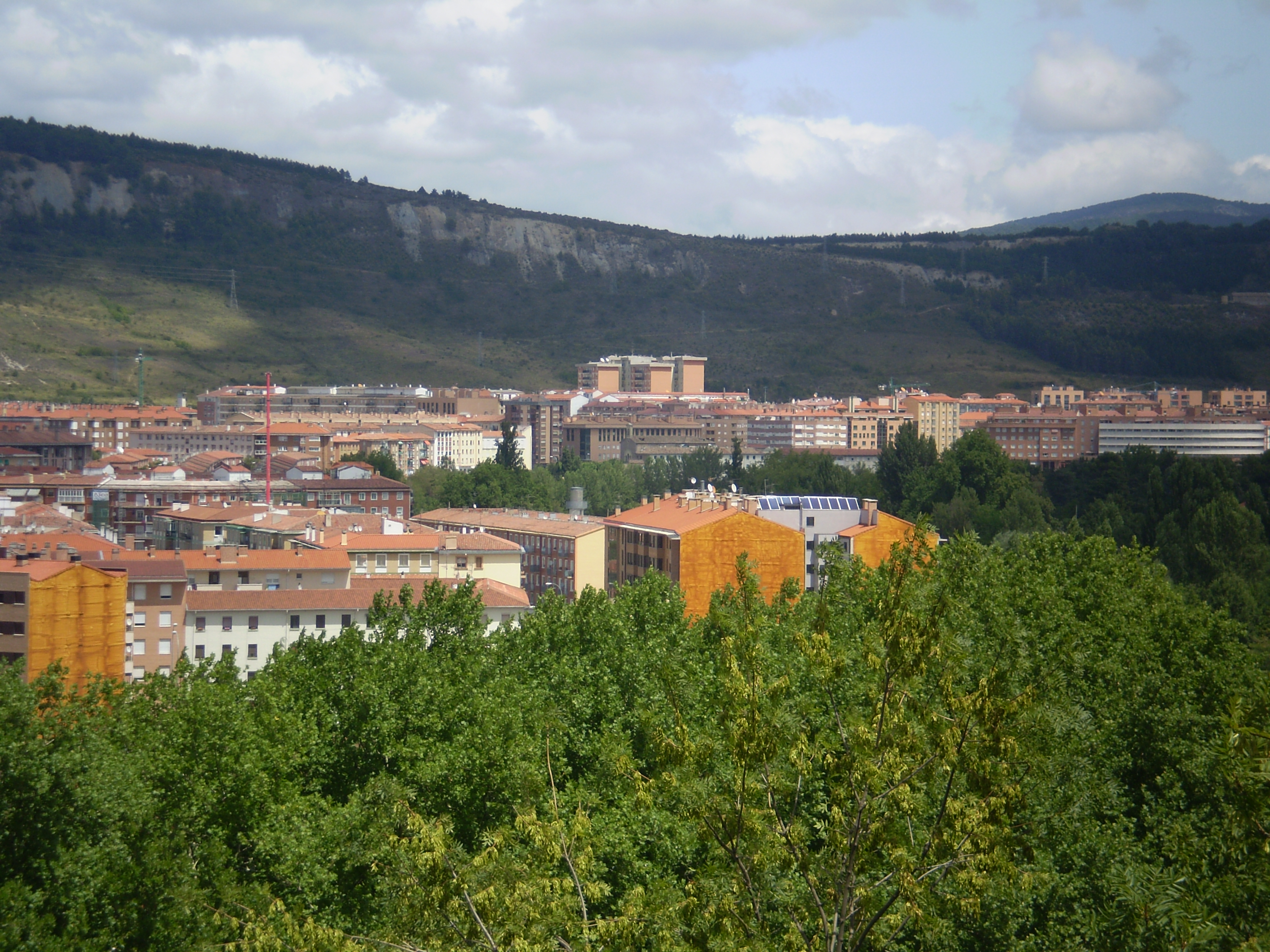 Vista de Ansoáin desde las murallas de Pamplona con el varrio pamplonés de la Rochapea en primer termino y el monte Ezcaba o San Cristobal de fondo.